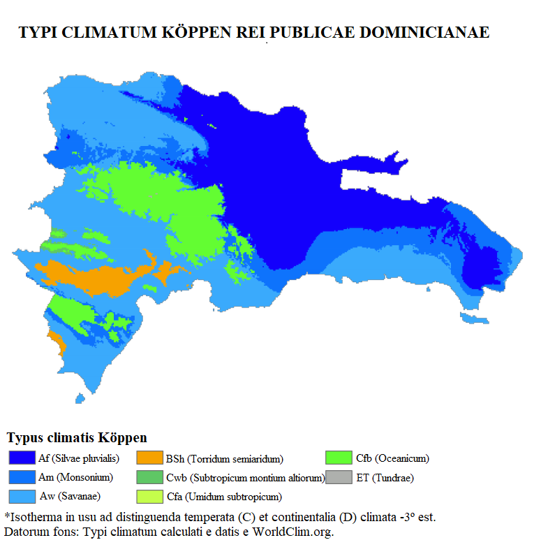 Typi climatum Köppen Rei publicae Dominicianae